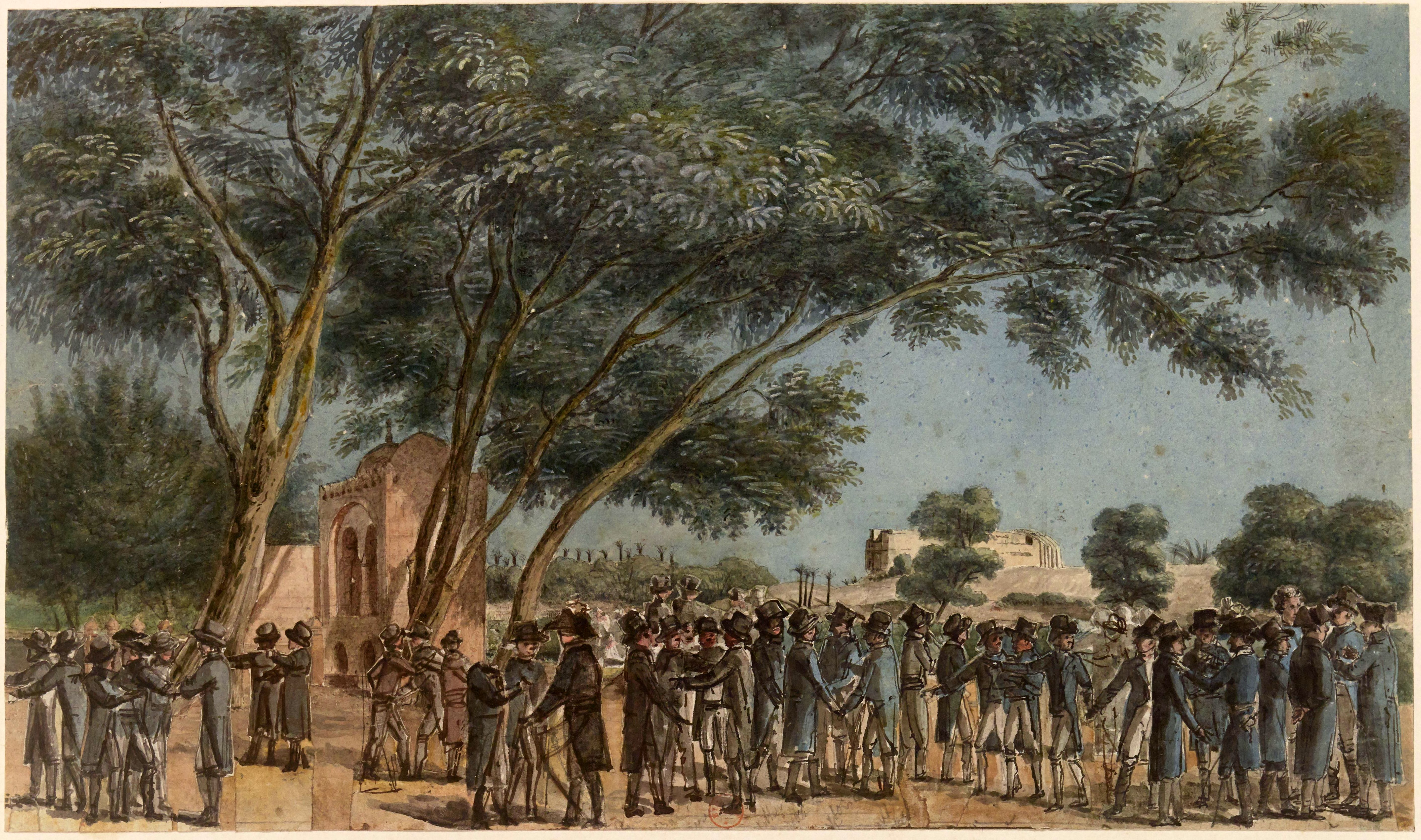 Jardins de l'Institut (Le Caire), dessinateur présumé André Dutertre, 1798-1809